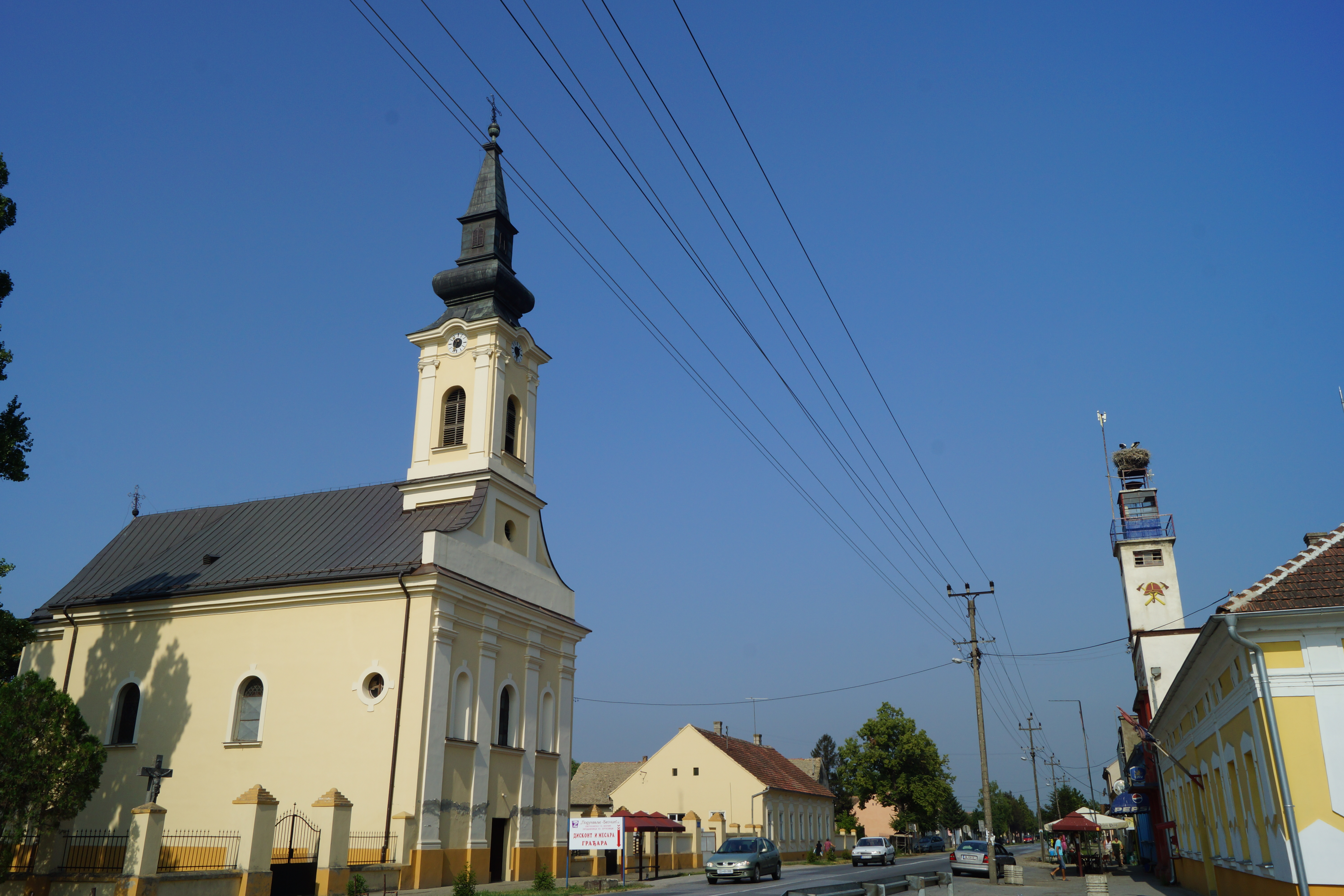 Visedeceniski stanovnik Hrtkovaca-Roda sa mladima